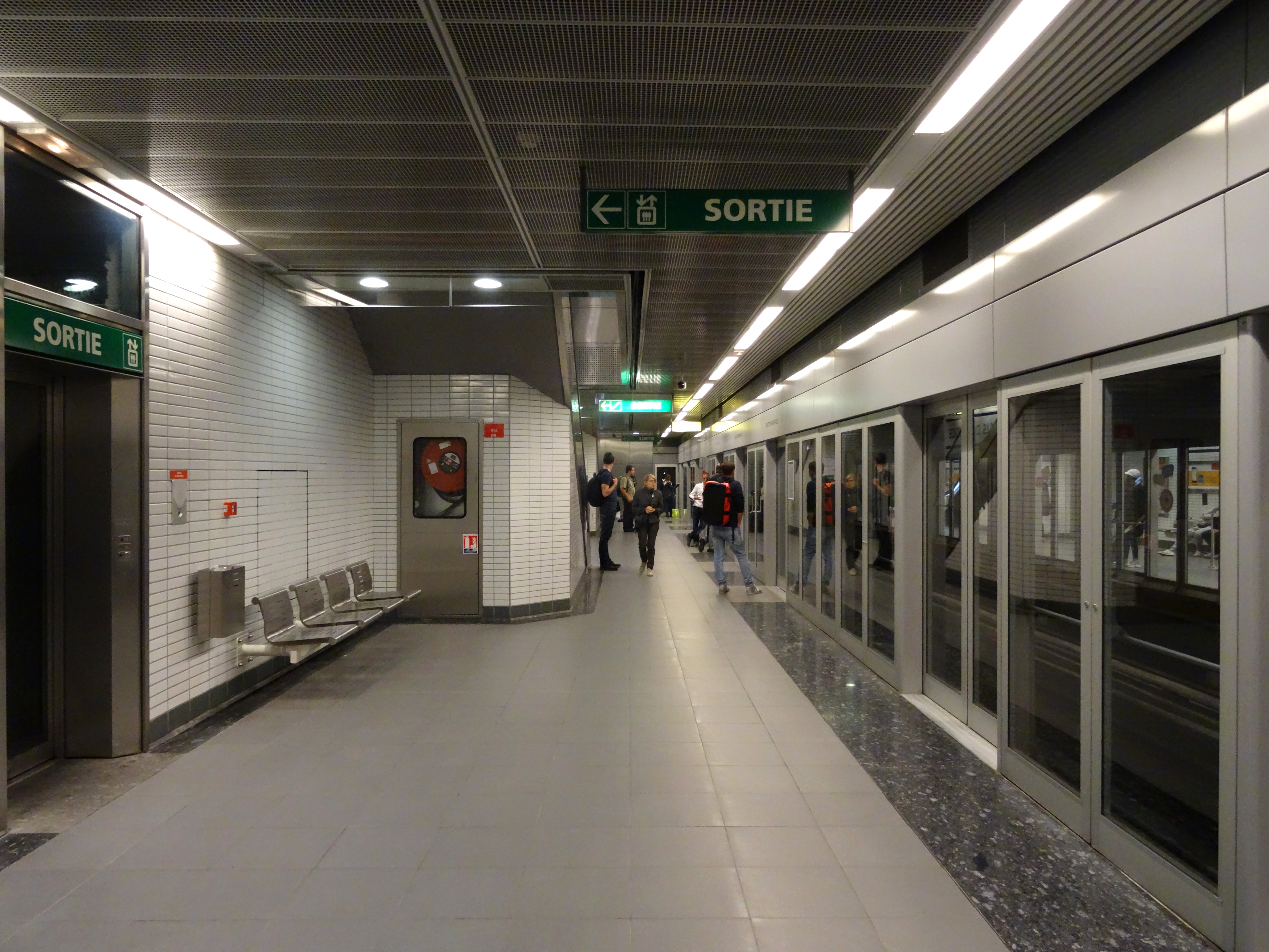 Ligne B